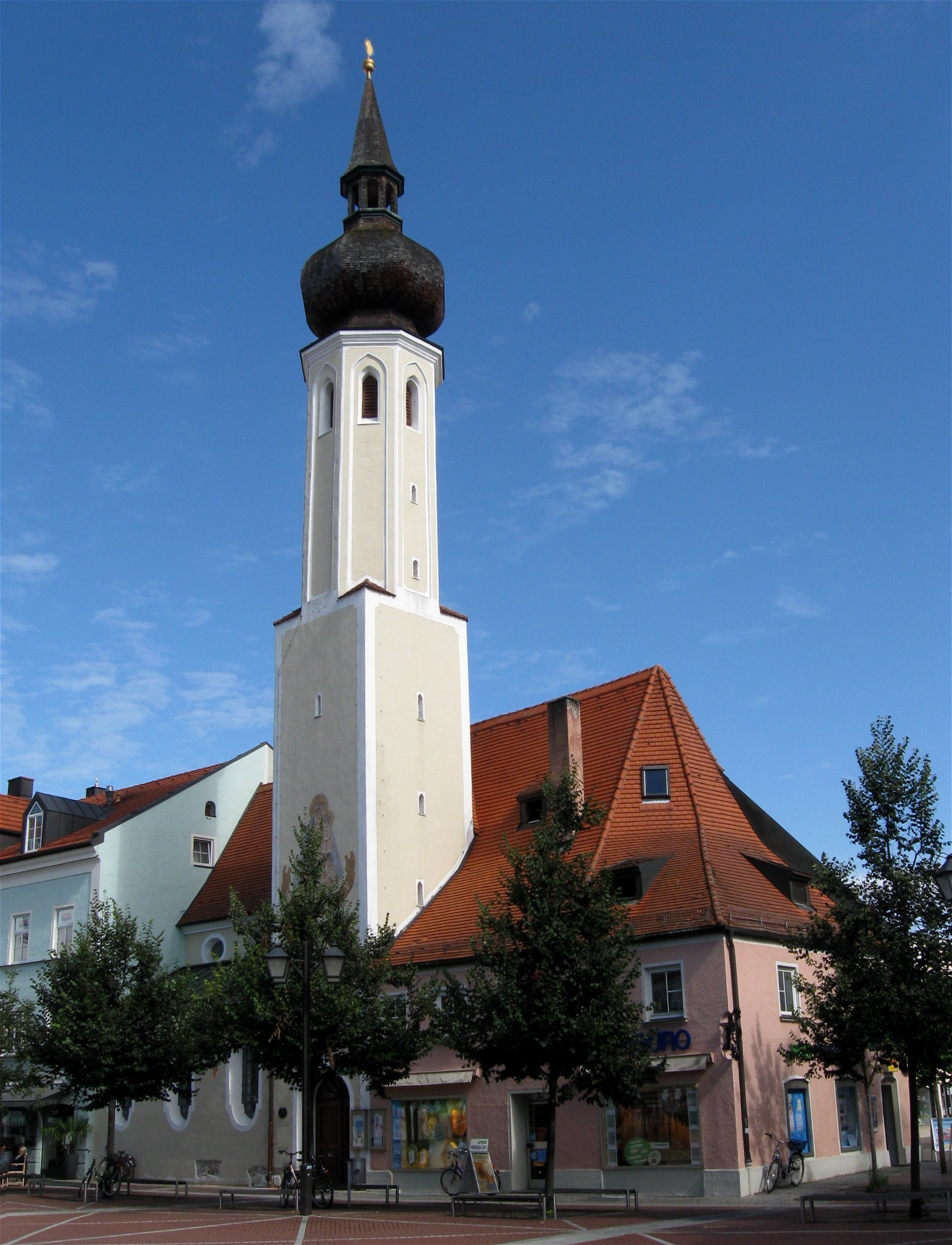 Schrannenplatz 3. Ehem. Frauenkirche, Ende 14. Jh., seit dem 19. Jh. profanisiert.